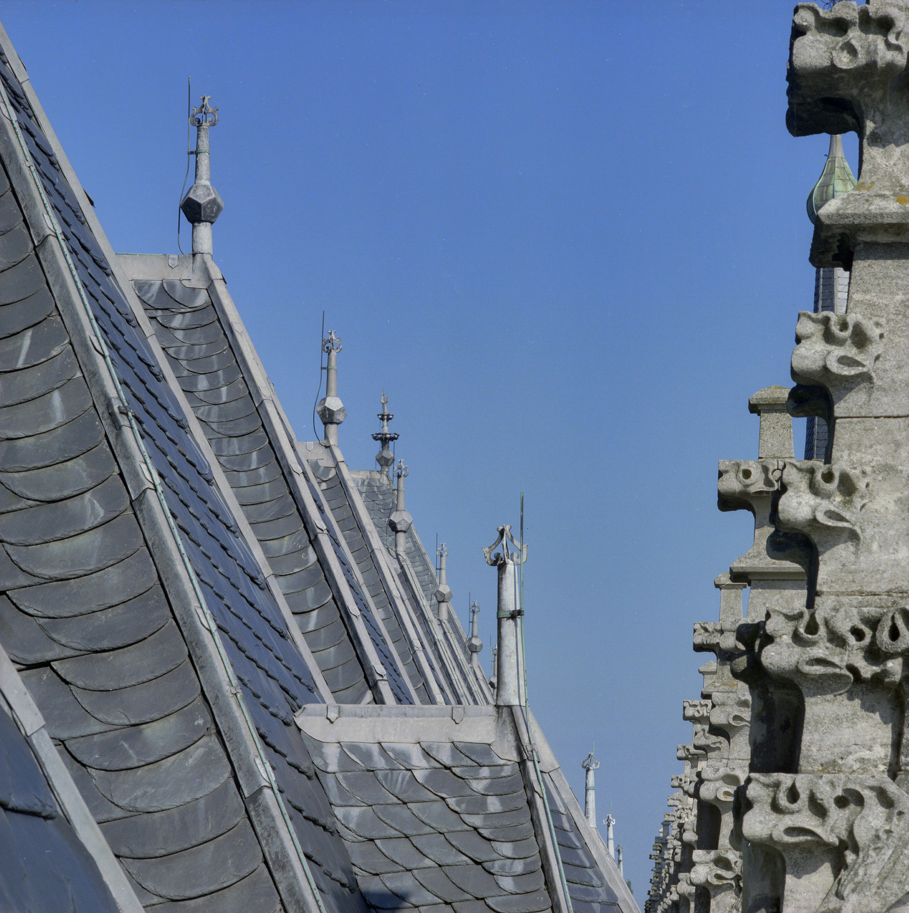 Grote- of Lebuïnuskerk: Detail van pinakels met kruisbloemen en bliksemafleiders op het dak